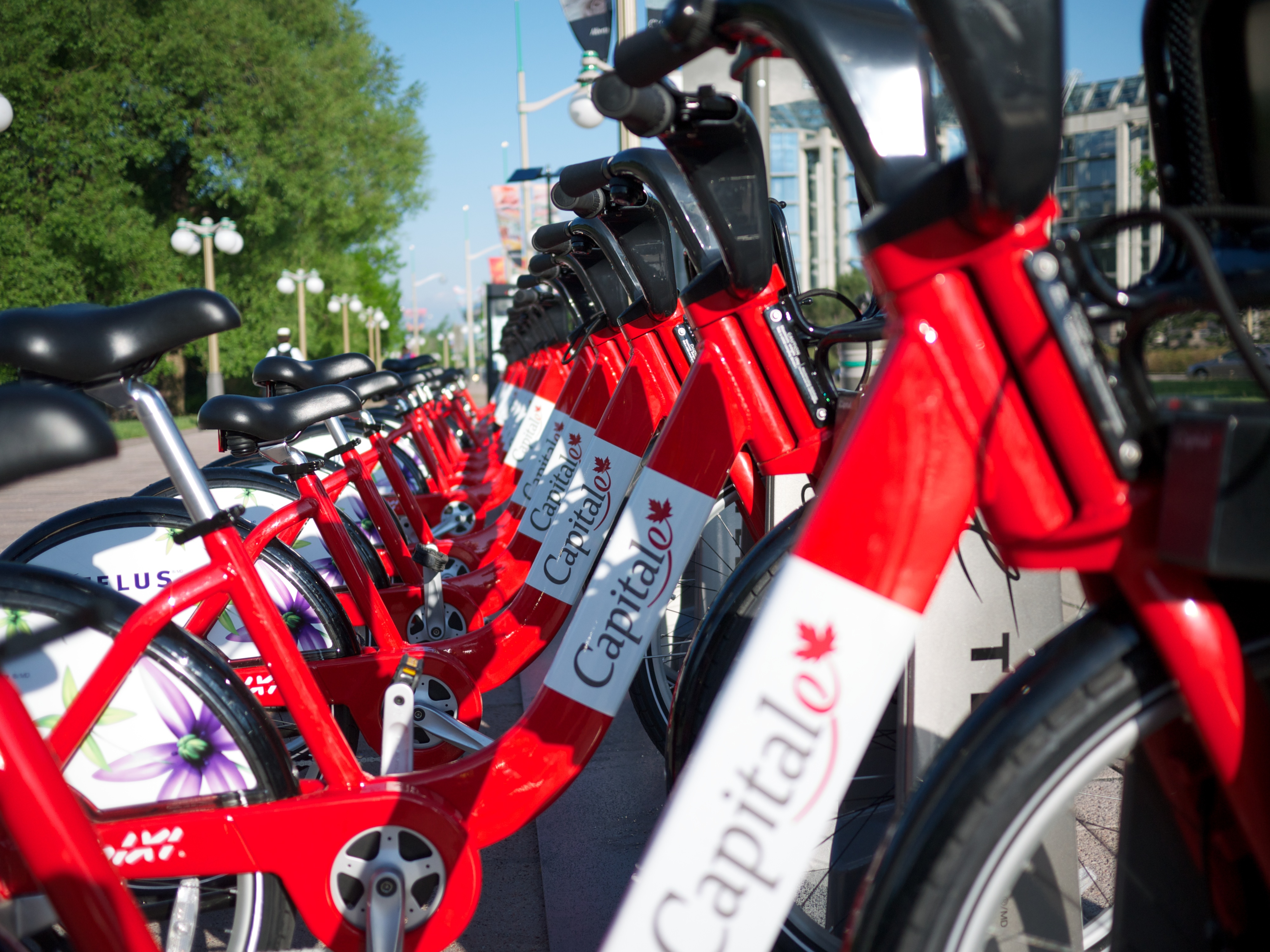 B-B-B-B-Bixi